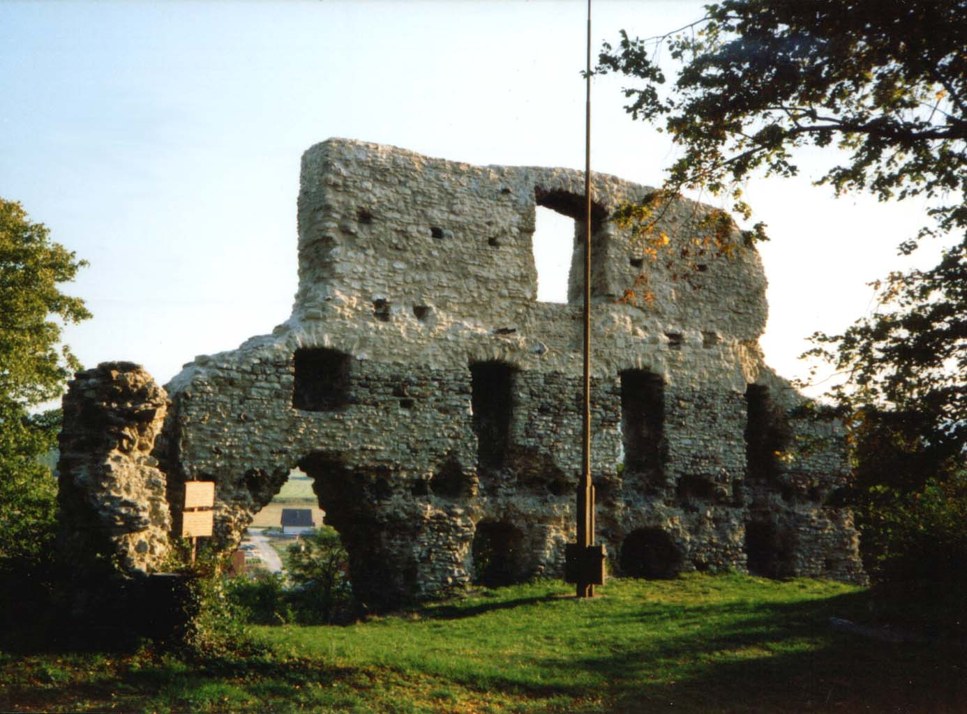 Ruine der Stapelburg